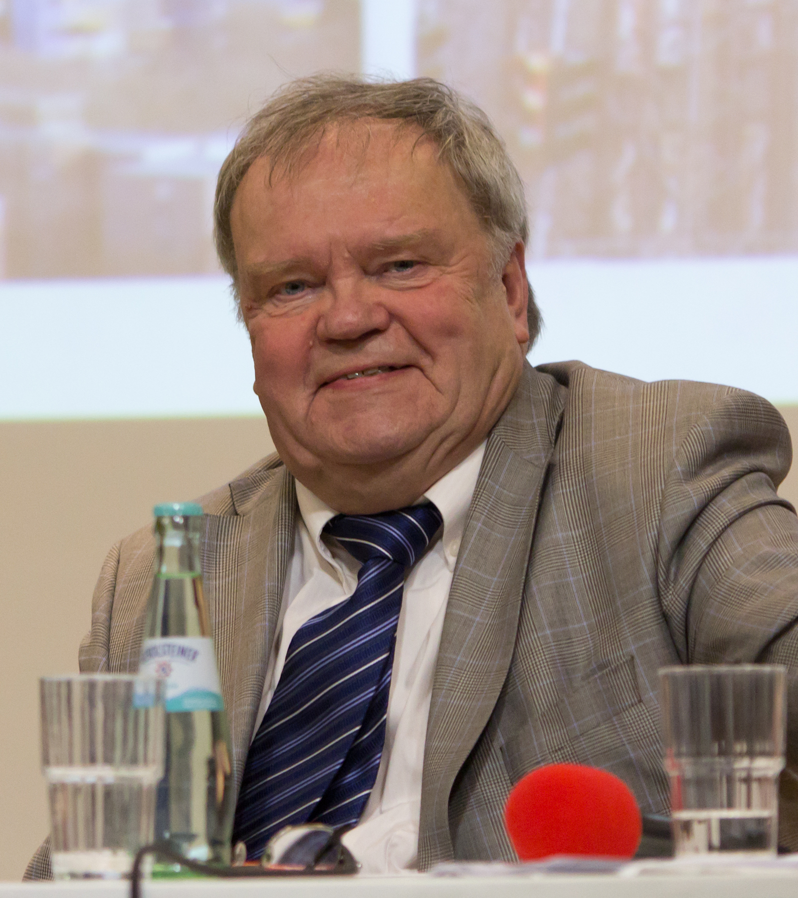 Heinz-Günter Horn, deutscher Provinzialrömischer Archäologe und Bodendenkmalpfleger, bei einer Veranstaltung des Architekturforums Rheinland 2014 im Kölner Domforum